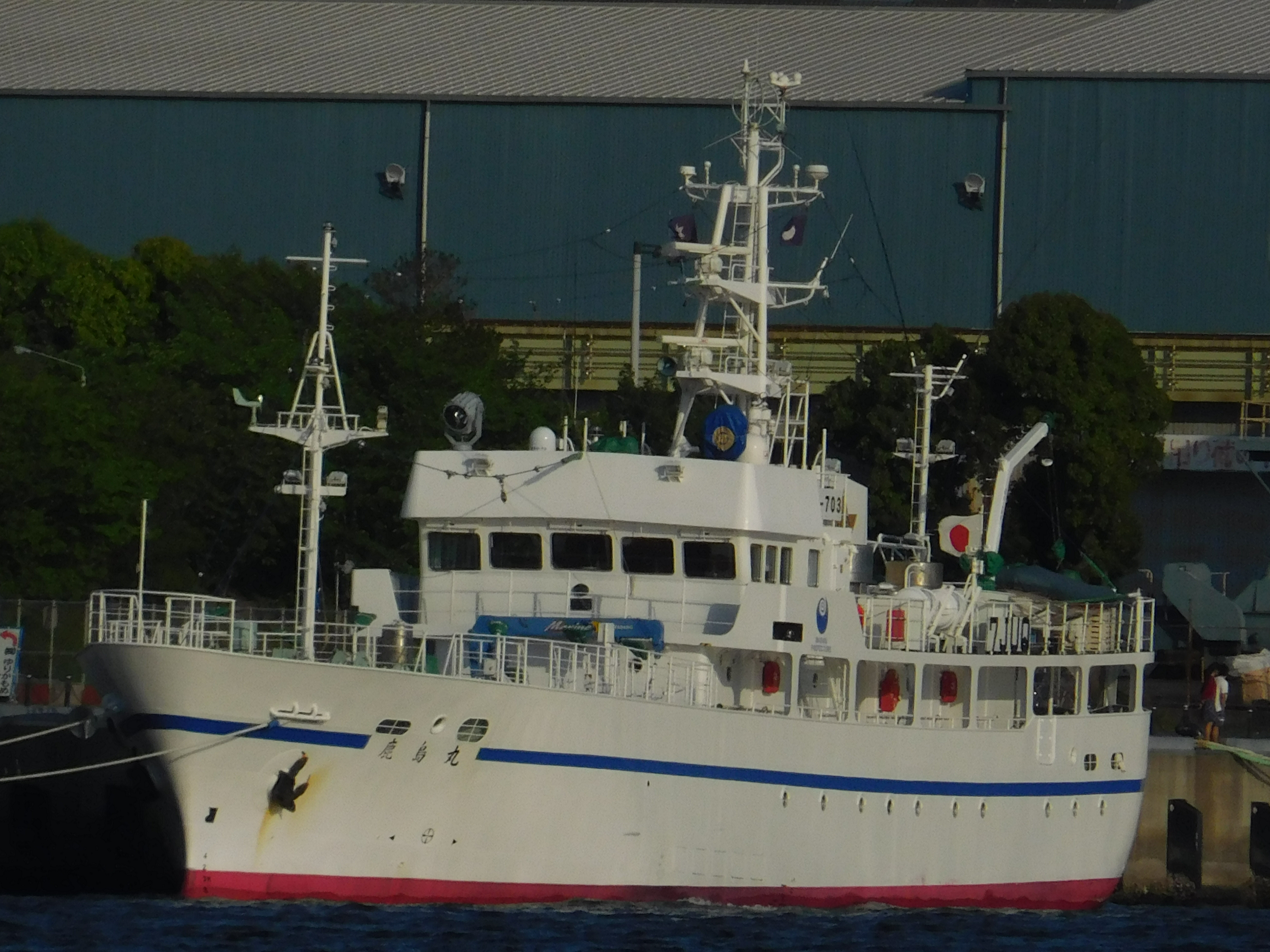 茨城県立海洋高校の練習船５台目鹿島丸 東京港で斜め前から